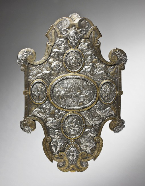 Paradsköld, troligen tillverkad av Eliseus Libaerts i Antwerpen ca 1560, efter förlaga av Etienne Delaune, för Erik XIV:s räkning. Inventarienr. 7133